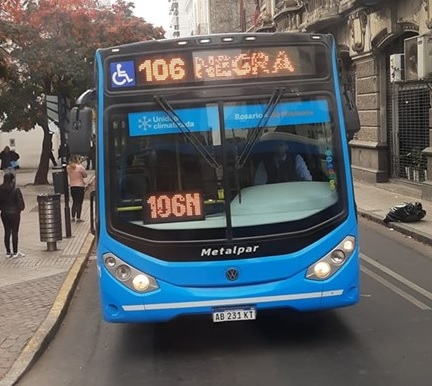 Unidad perteneciente a la empresa Movi, explotadora de la línea 106, desde el 20 de julio de 2019, en su variante "negra".